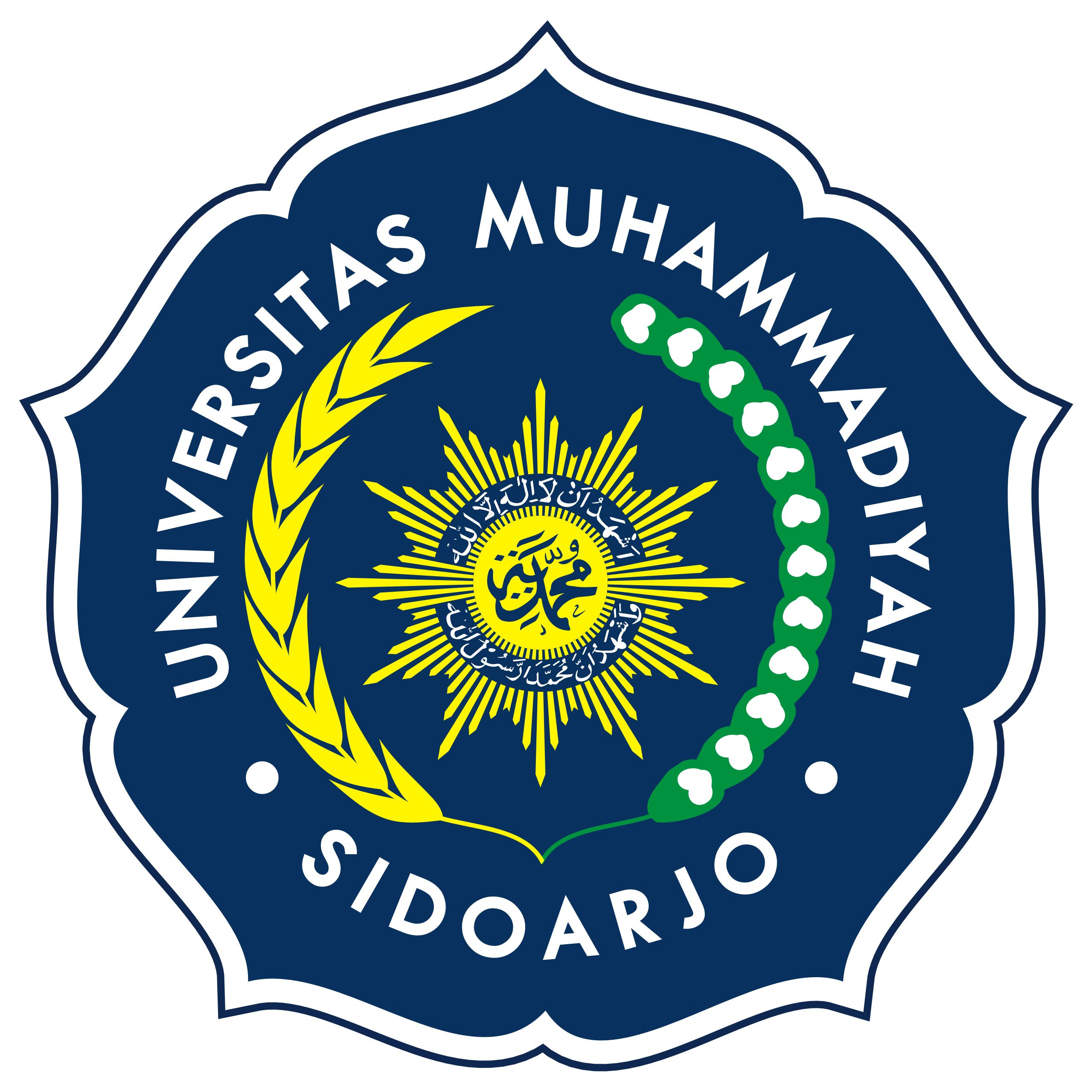 LOGO UNIVERSITAS MUHAMMADIYAH SIDOARJO